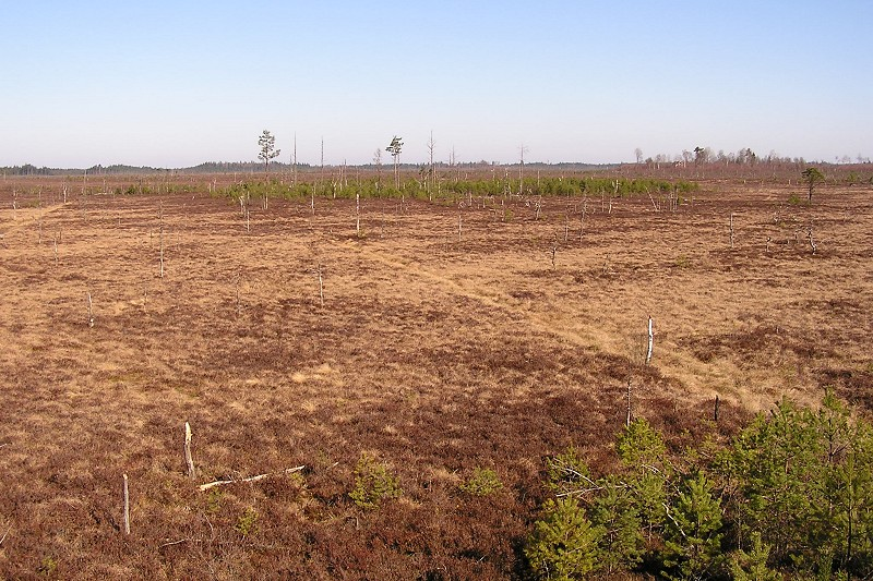 Vakö myr från sydväst. Taget nära väster om Hökön.